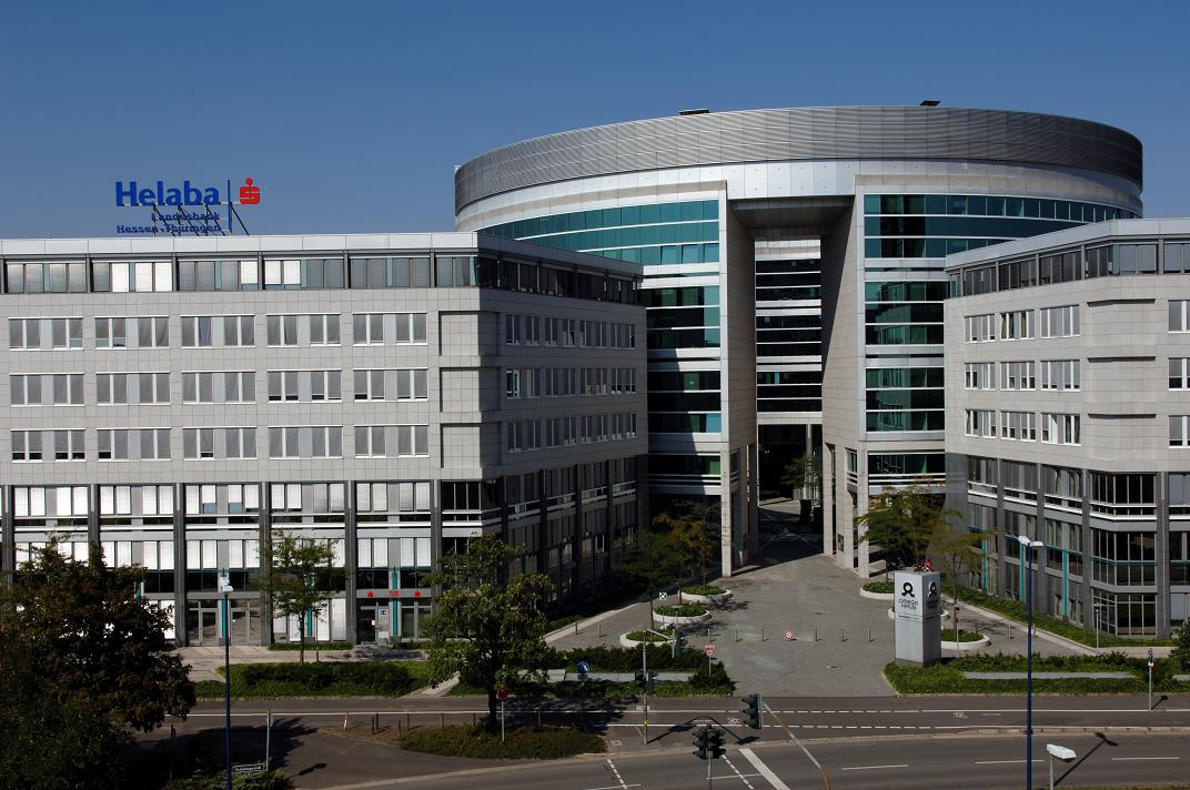 Bürogebäude der LTH - Bank für Infrastruktur